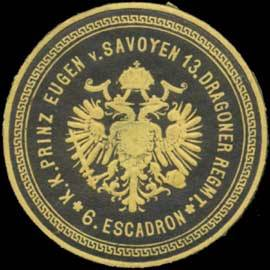 Sealing stamp Title: K.K. Prinz Eugen von Savoyen 13. Dragoner Regiment 6. Escadron Description: gelb, schwarz, geprägt Place: size: 4 cm